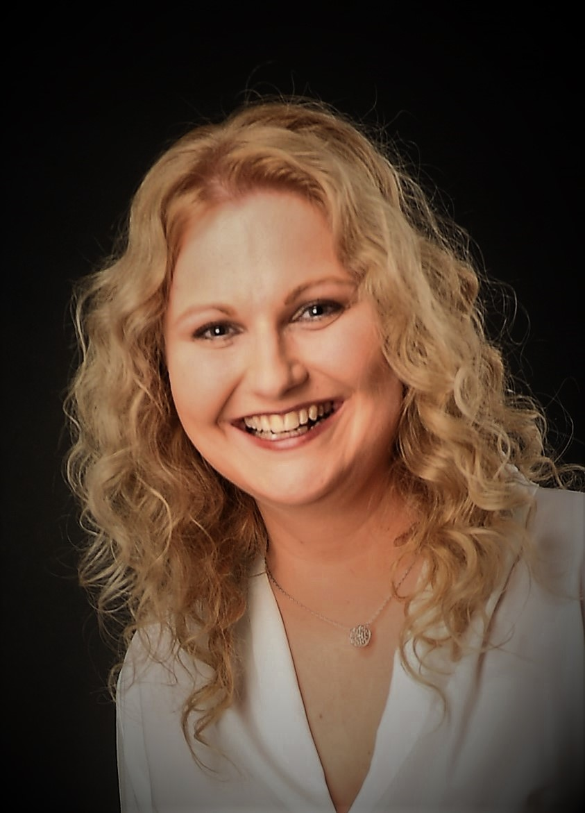 Portrait Nadja Hirsch, Coachoo GmbH